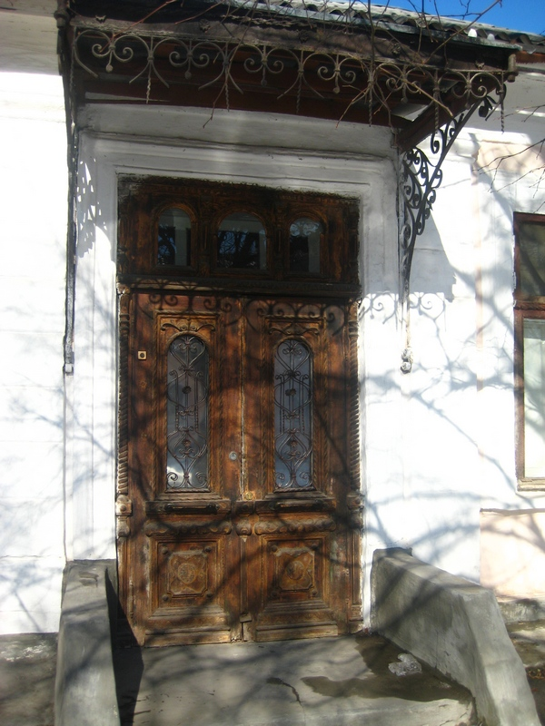 Дом Берга (вход)